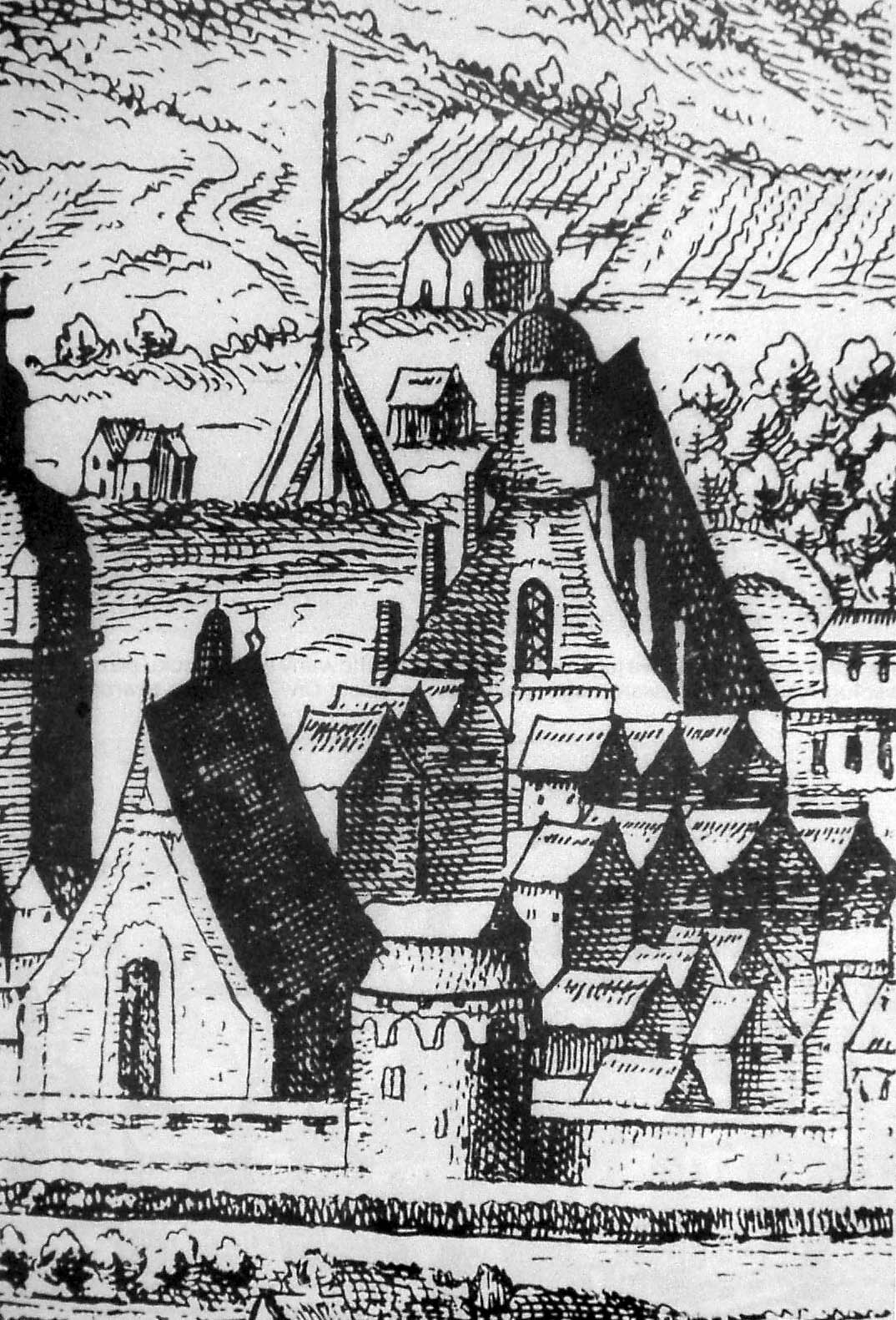 Костел Святого хреста і монастир францисканців (передній план), Старий готичний костел домініканців (на місці теперішнього нового - барокового). Гравюра Абрагама Гогенберґа за малюнком Ауреліо Пасарротті, поч. XVIII ст.